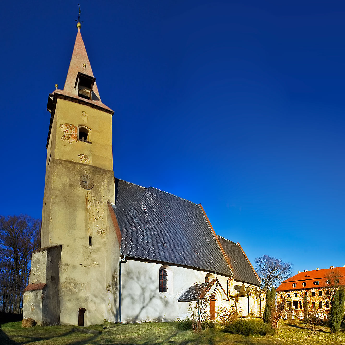 Kościół i pałac w Borowie Wielkim